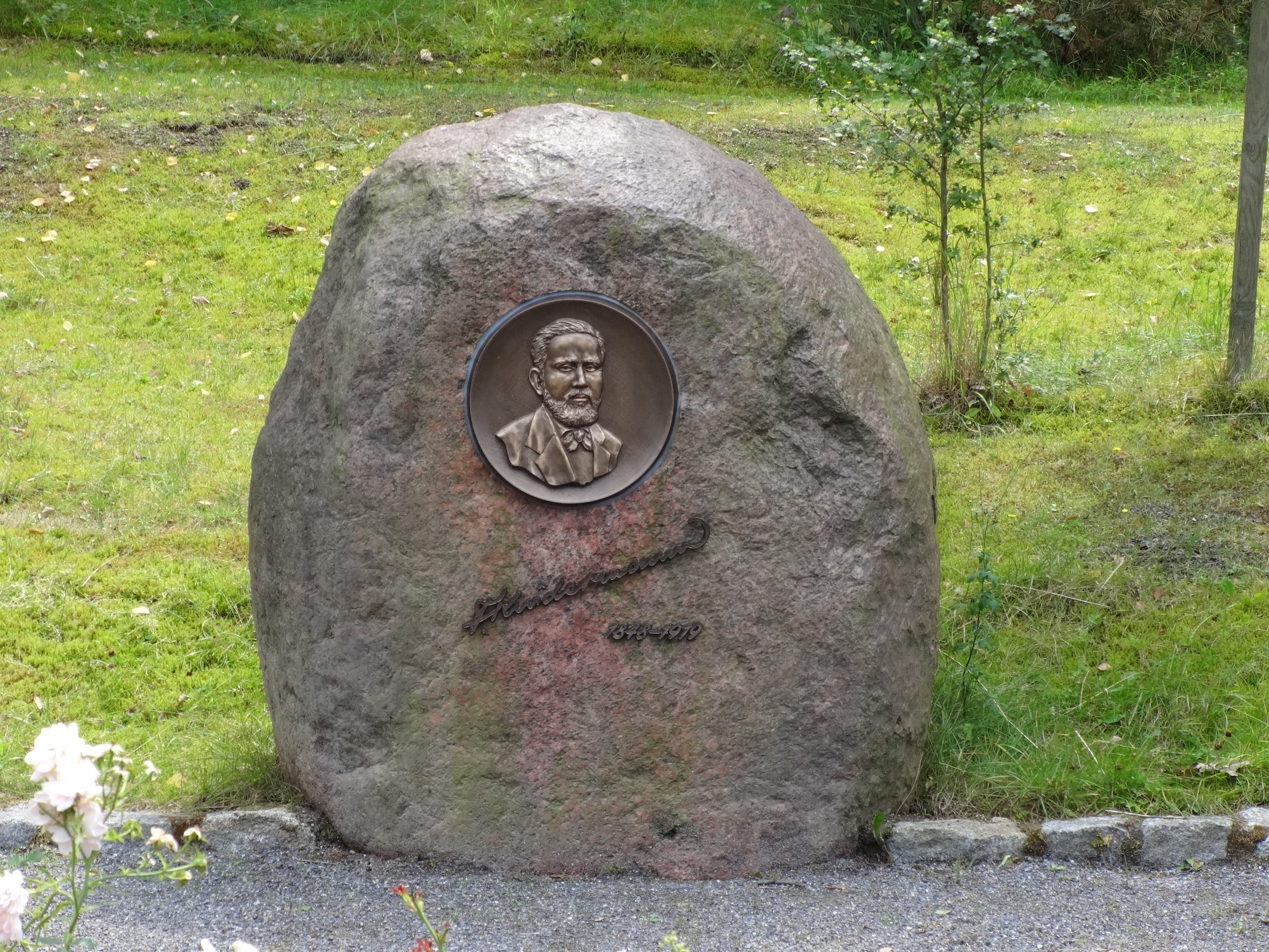 Findling mit dem Konterfei von Ferdinand Kindermann, dem Begründer von Waldsieversdorf